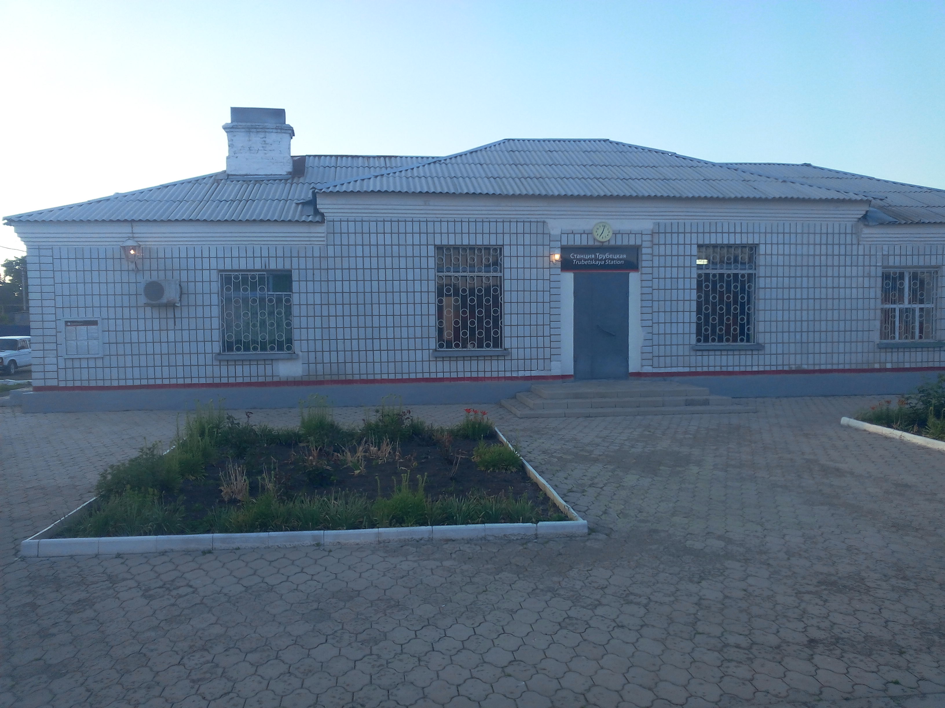 вокзал станции Трубецкая (посёлок Гигант Сальский район, Ростовская область)